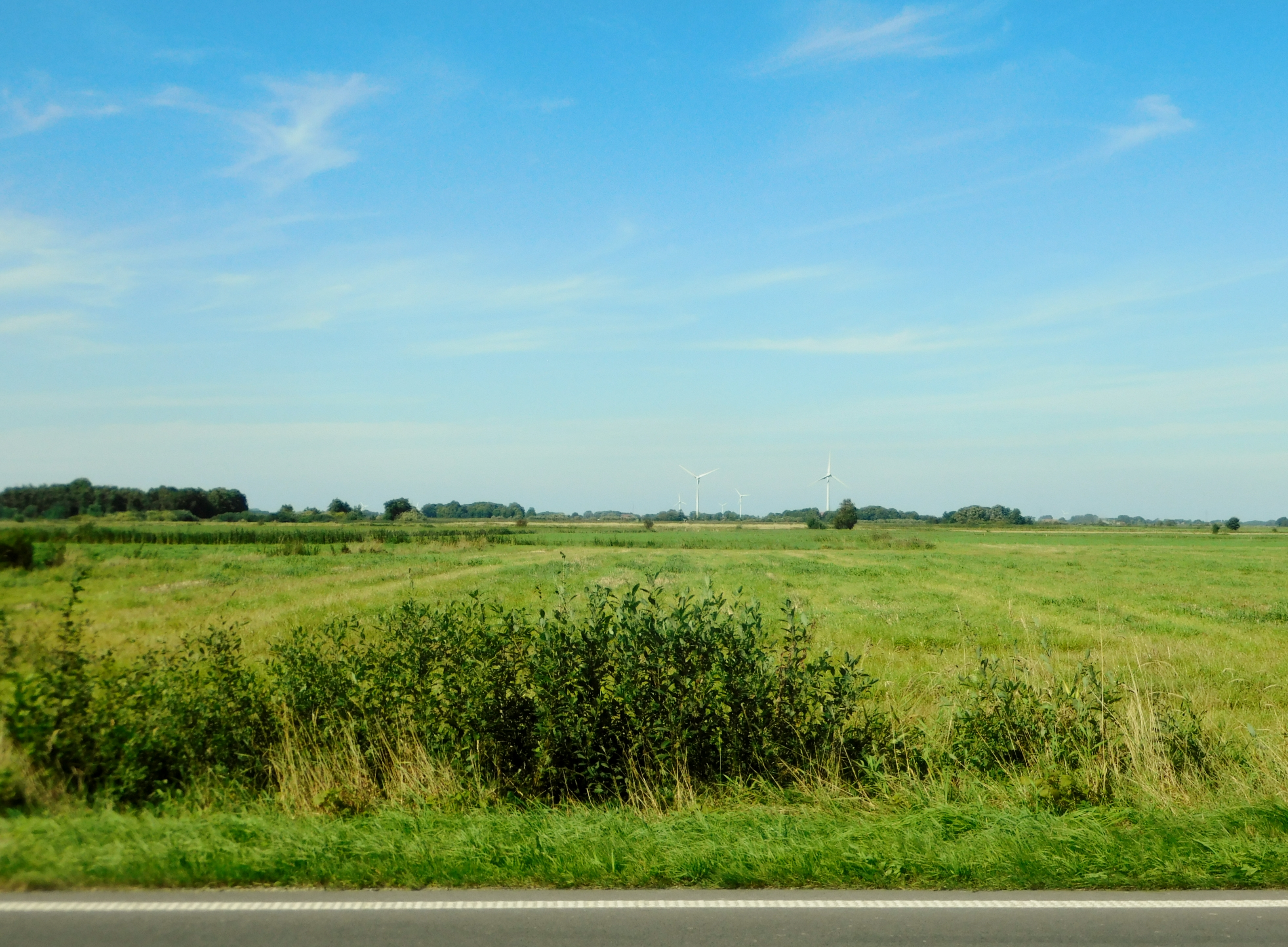 Marschland - ehemaligen Hilgenrieder Bucht, vom Geestrand in Blandorf-Wichte aus gesehen